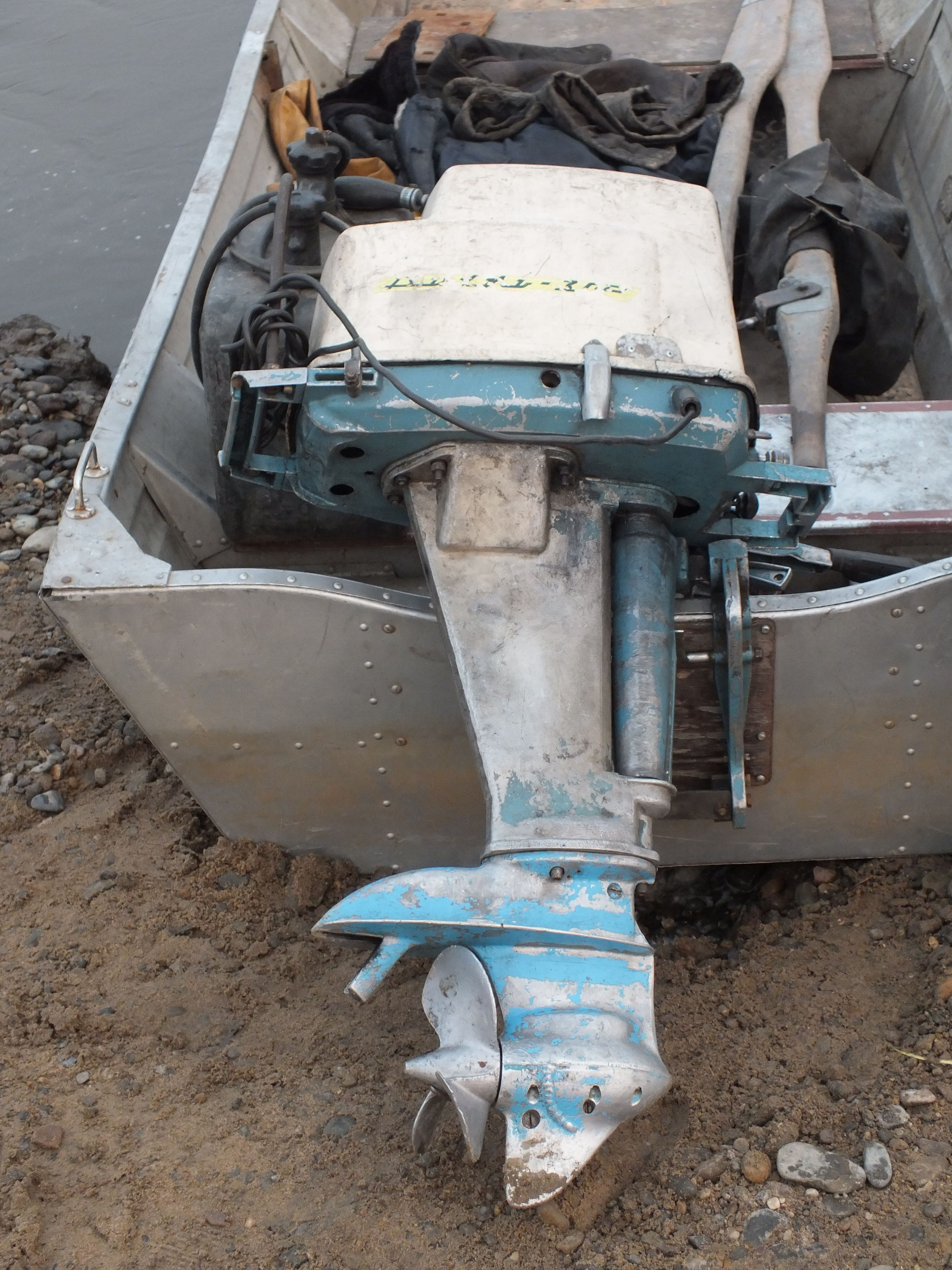 Лодочный мотор Вихрь-30